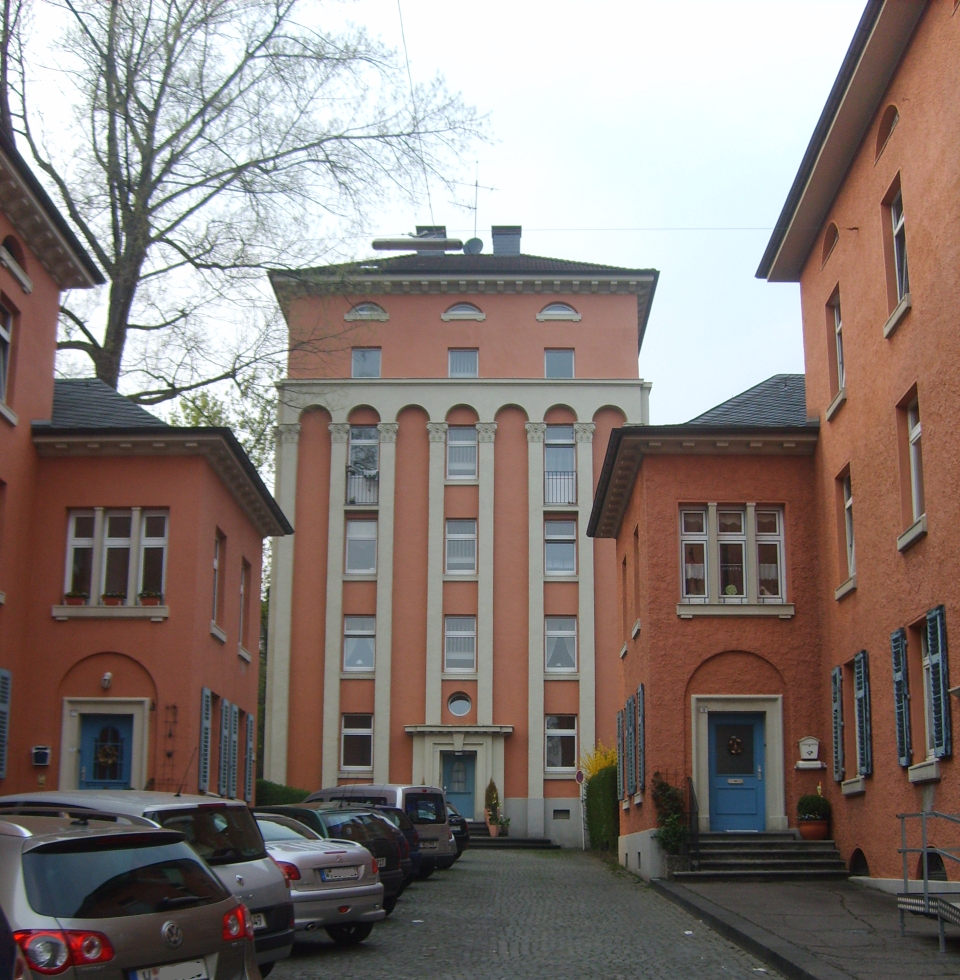 Wphnhof Münzstraße, Sedansberg, Wuppertal.